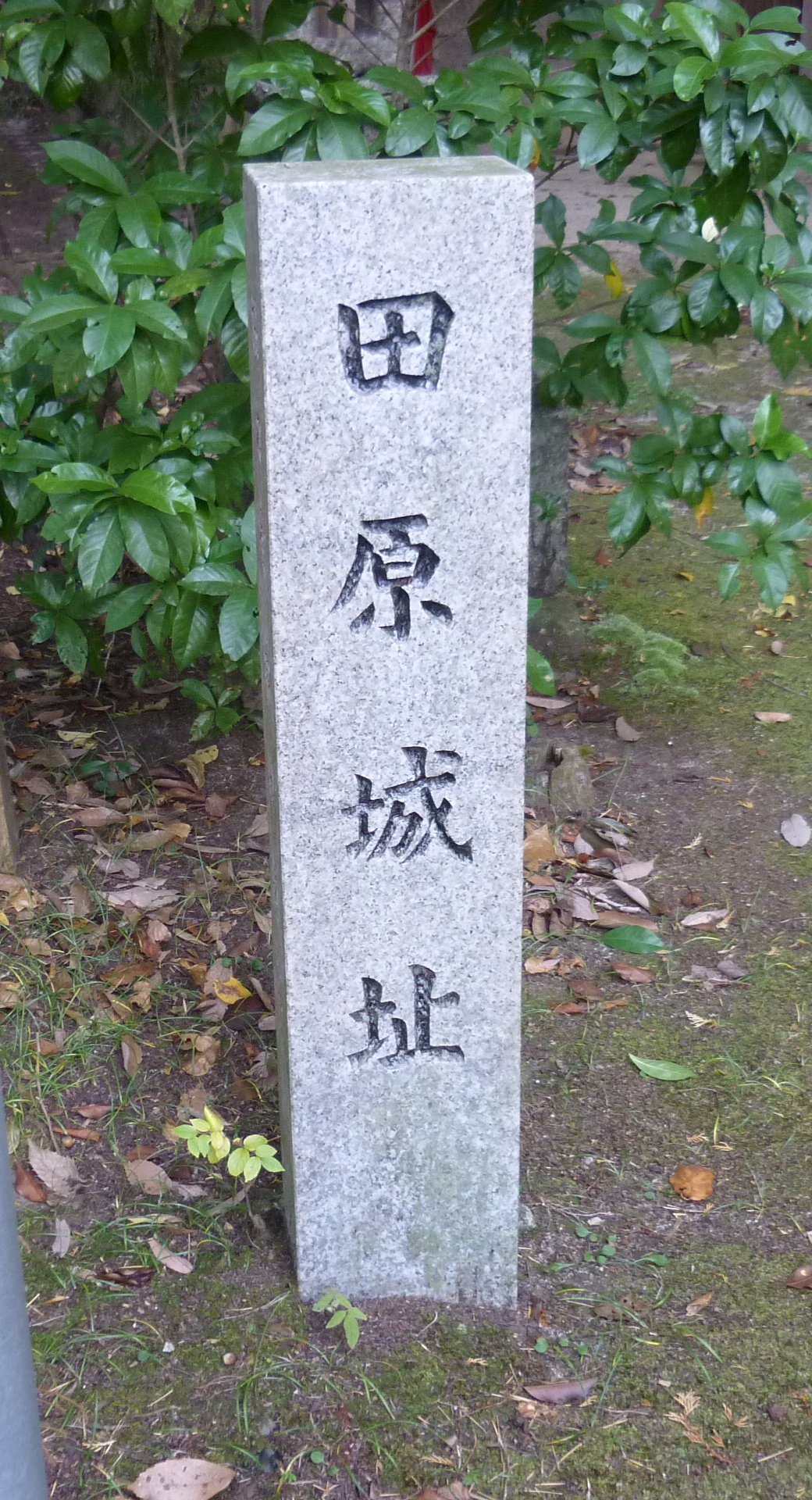 田原城の石標